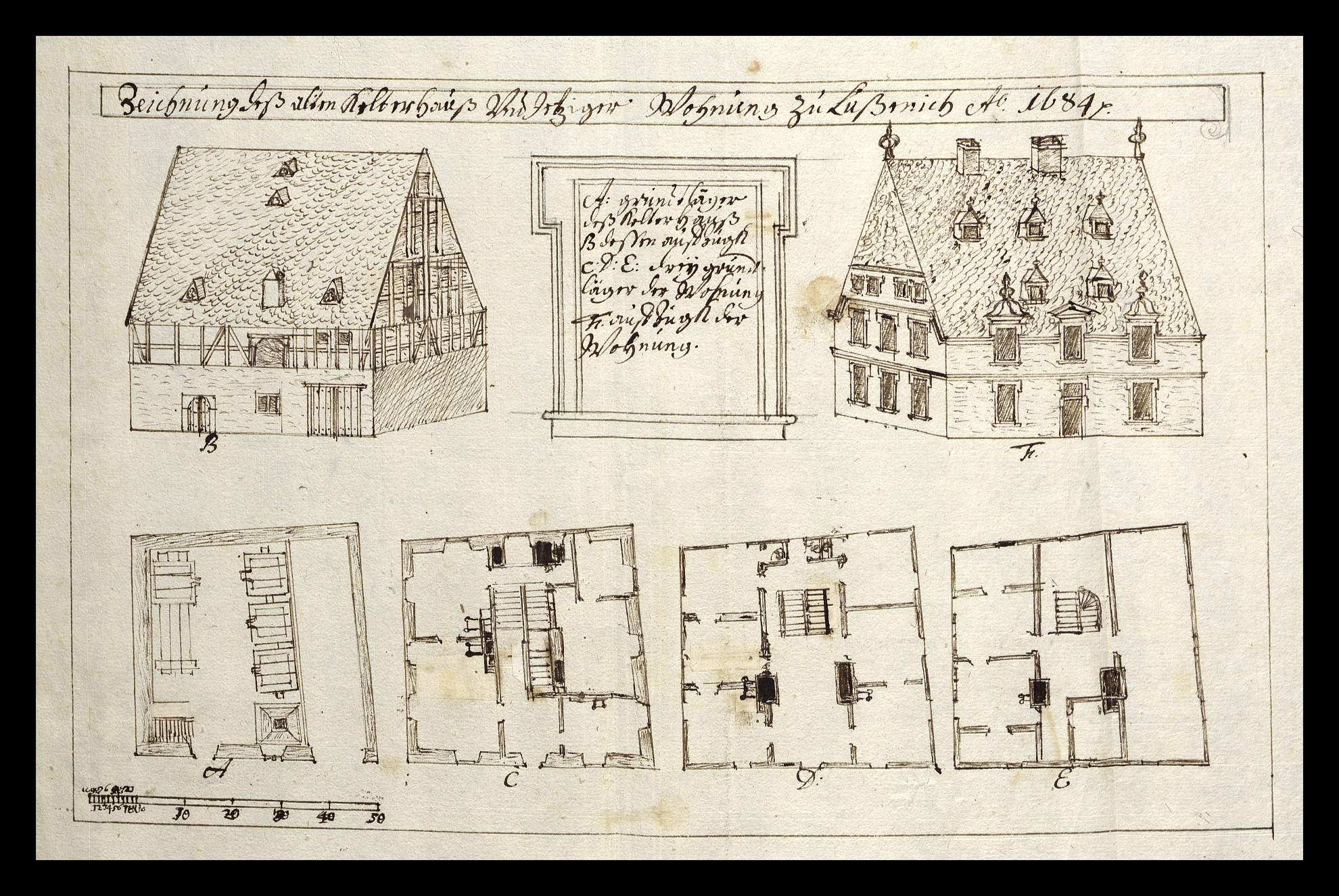 Historische Handskizzen zum Umbau des ehemaligen Kelterhauses der Lösnicher Burg im Jahre 1683/84